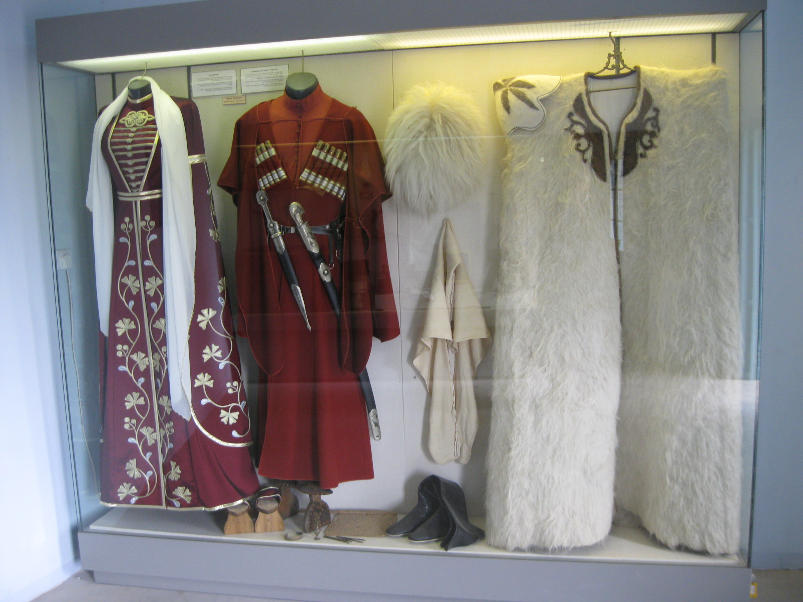 המרכז למורשת הצ'רקסית הוא מרכז מבקרים בכפר כמא שבגליל התחתון, הסוקר את ההיסטוריה של העם הצ'רקסי. במרכז קיים מוזיאון אשר מציג פריטים אותנטיים מהמורשת הצ'רקסית.